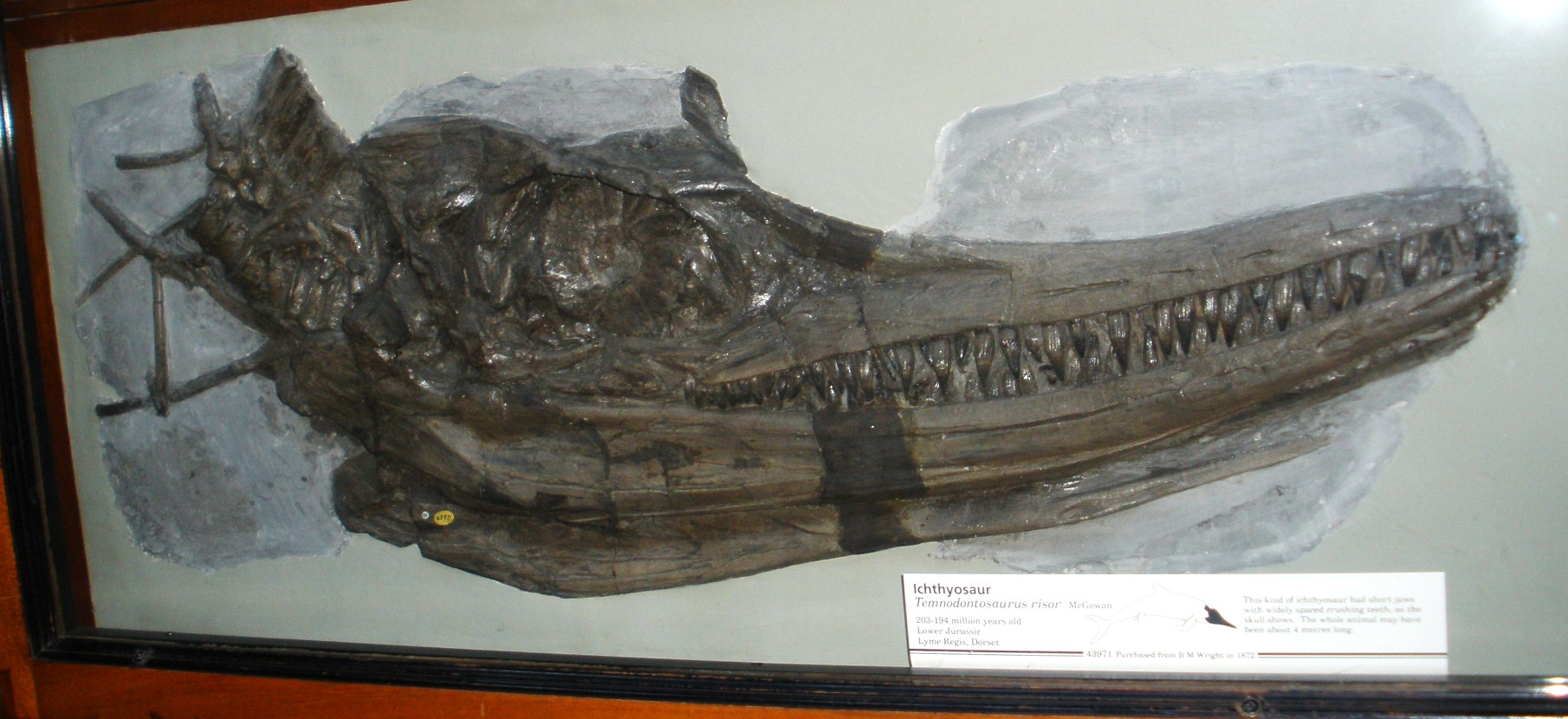 Fossil of Temnodontosaurus, an extinct reptile-- Took the photo at Natural History Museum, London